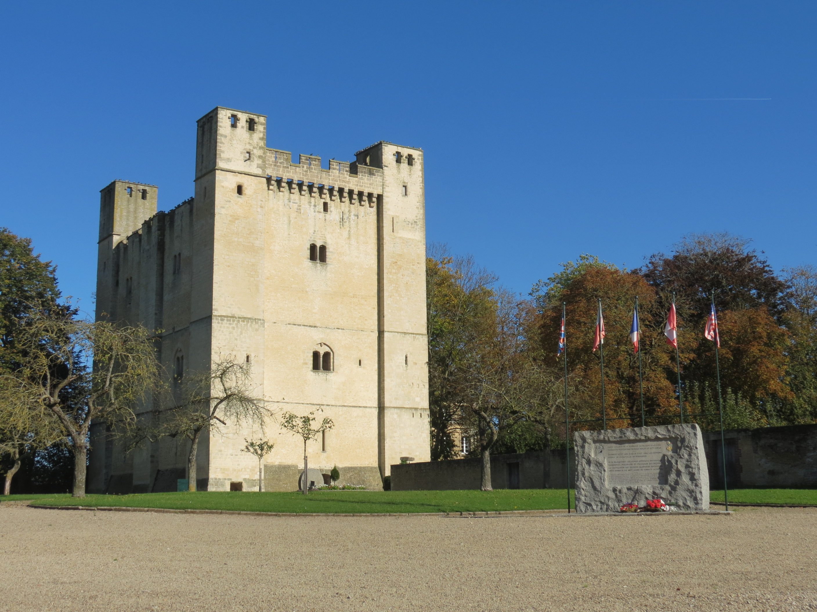 Vue de la place principale de Chambois